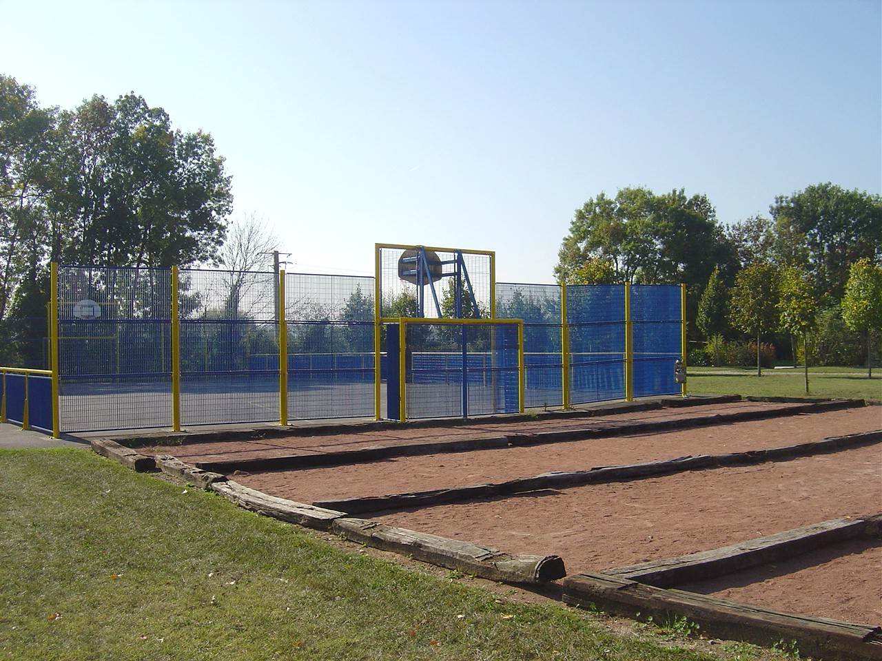 Terrain de sport de Limeray Indre-et-Loire France